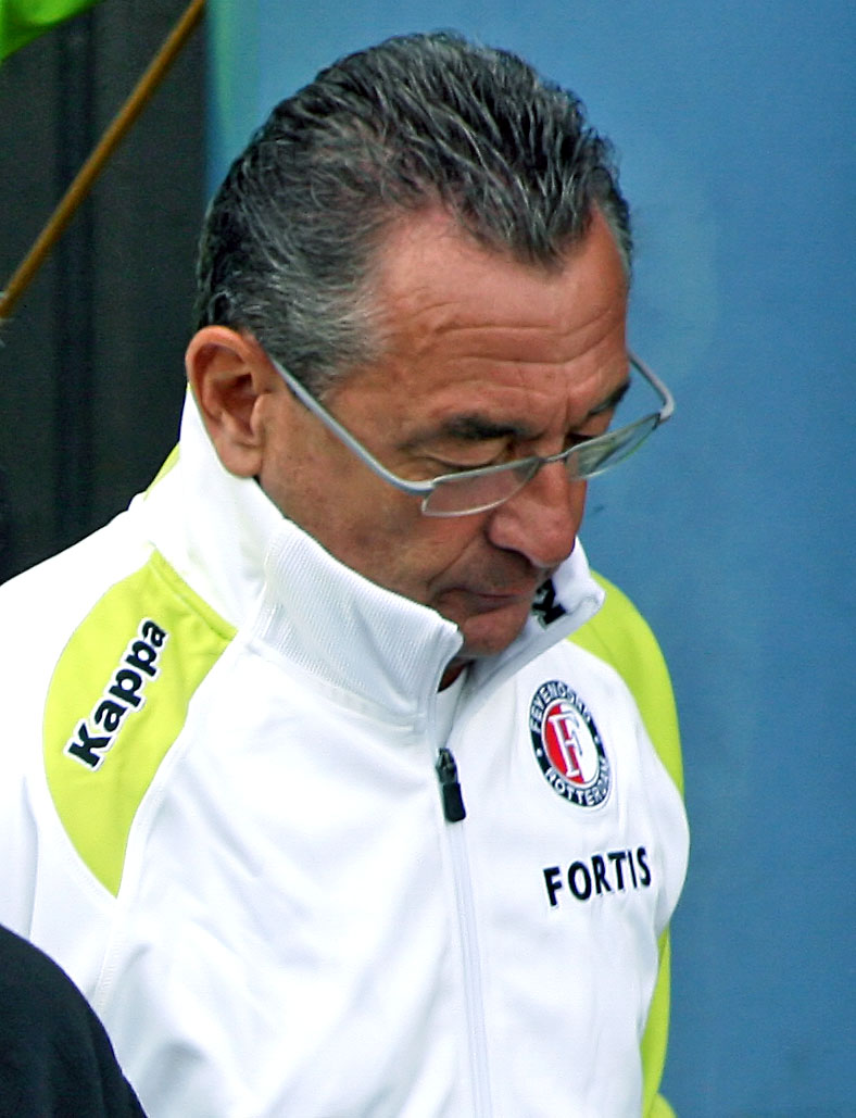 Dick Voorn (Feyenoord)